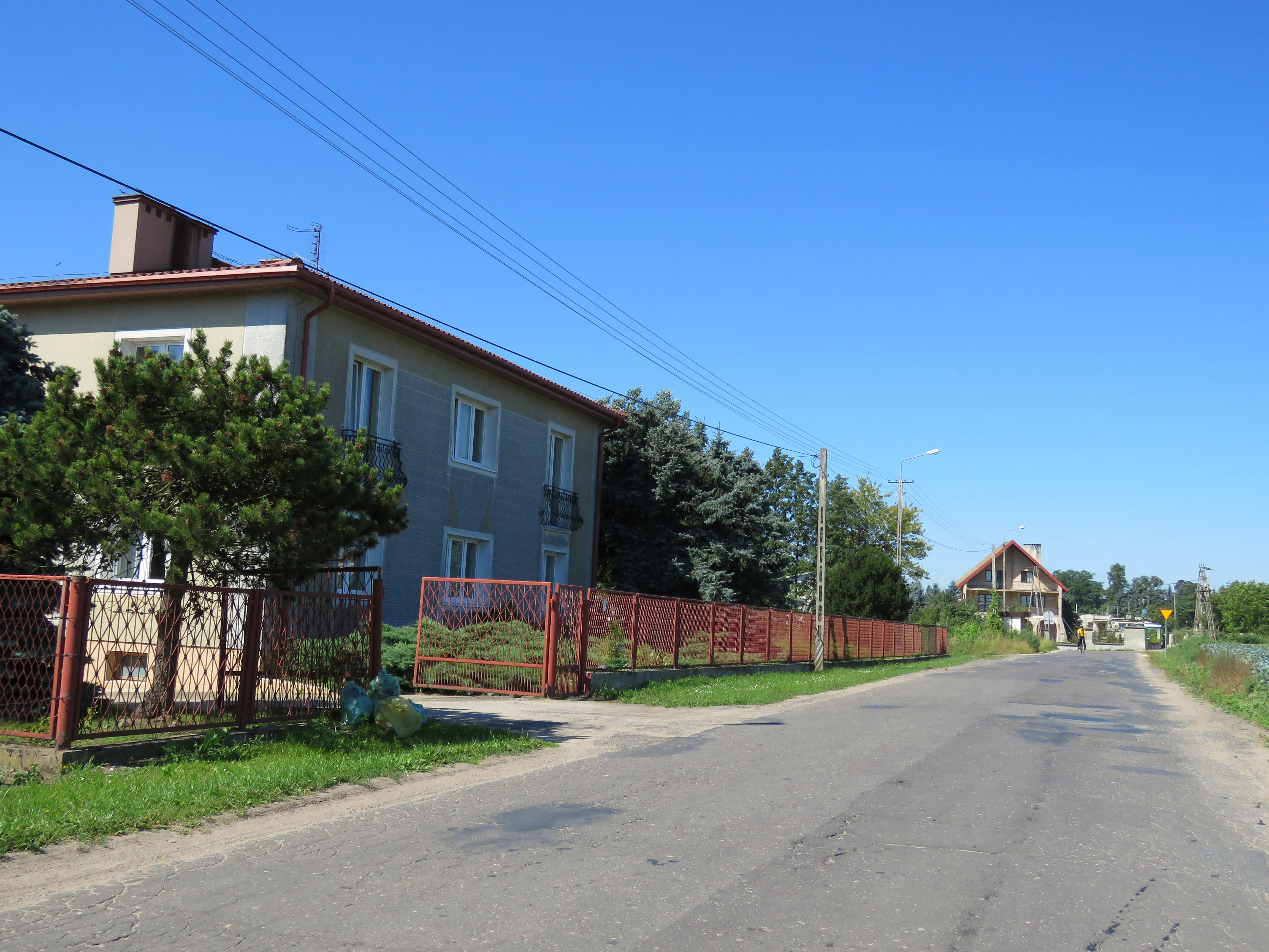 Trębki Nowe